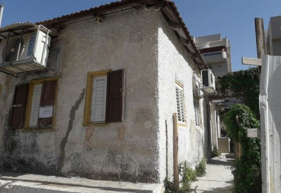 הכותל המזרחי של בית הכנסת